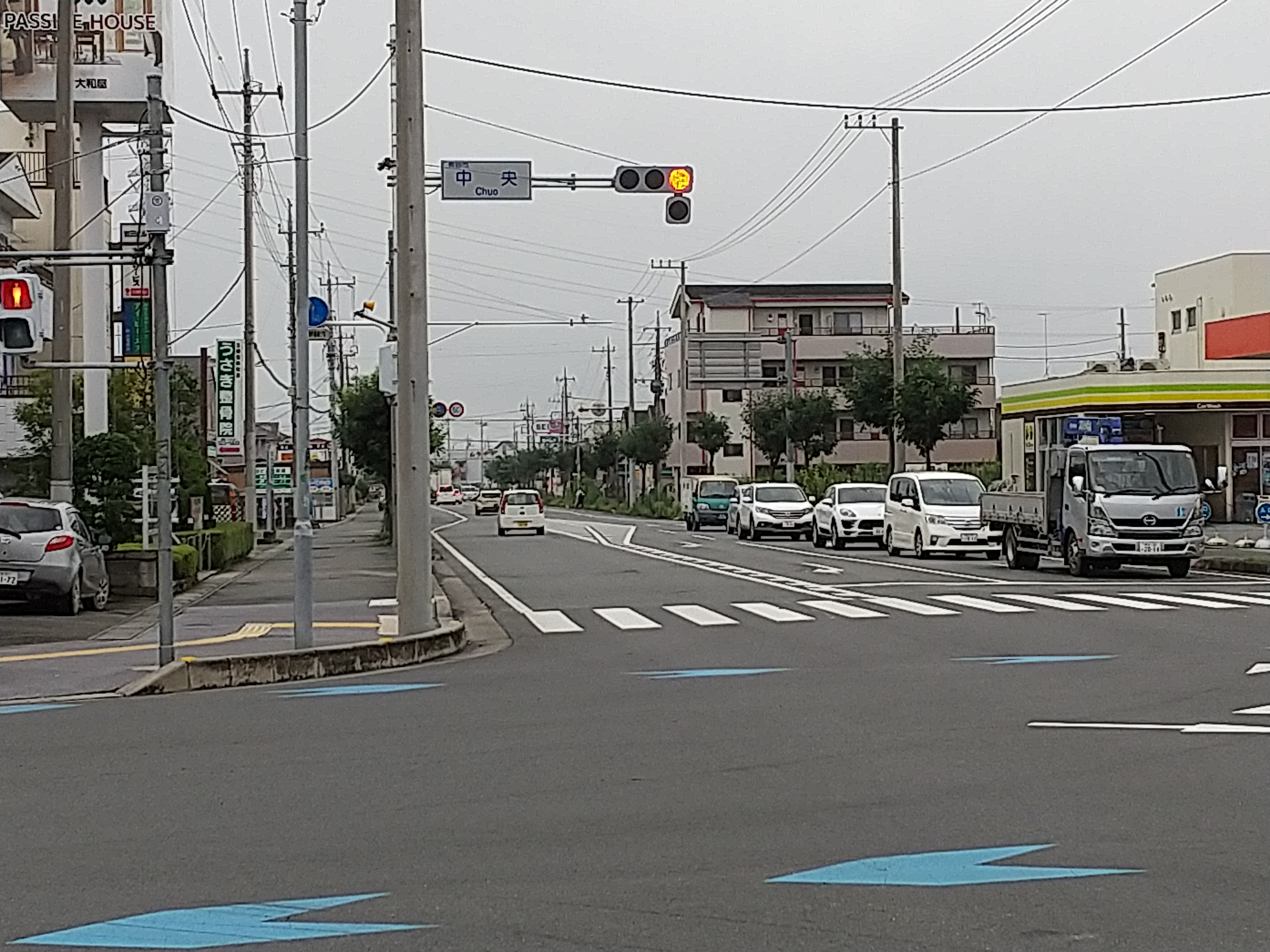 2019年7月撮影